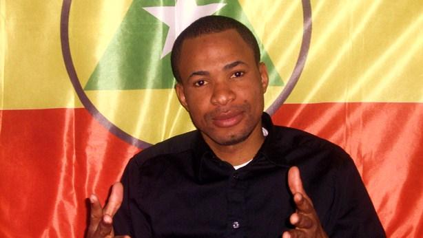 Le porte parole du Flec